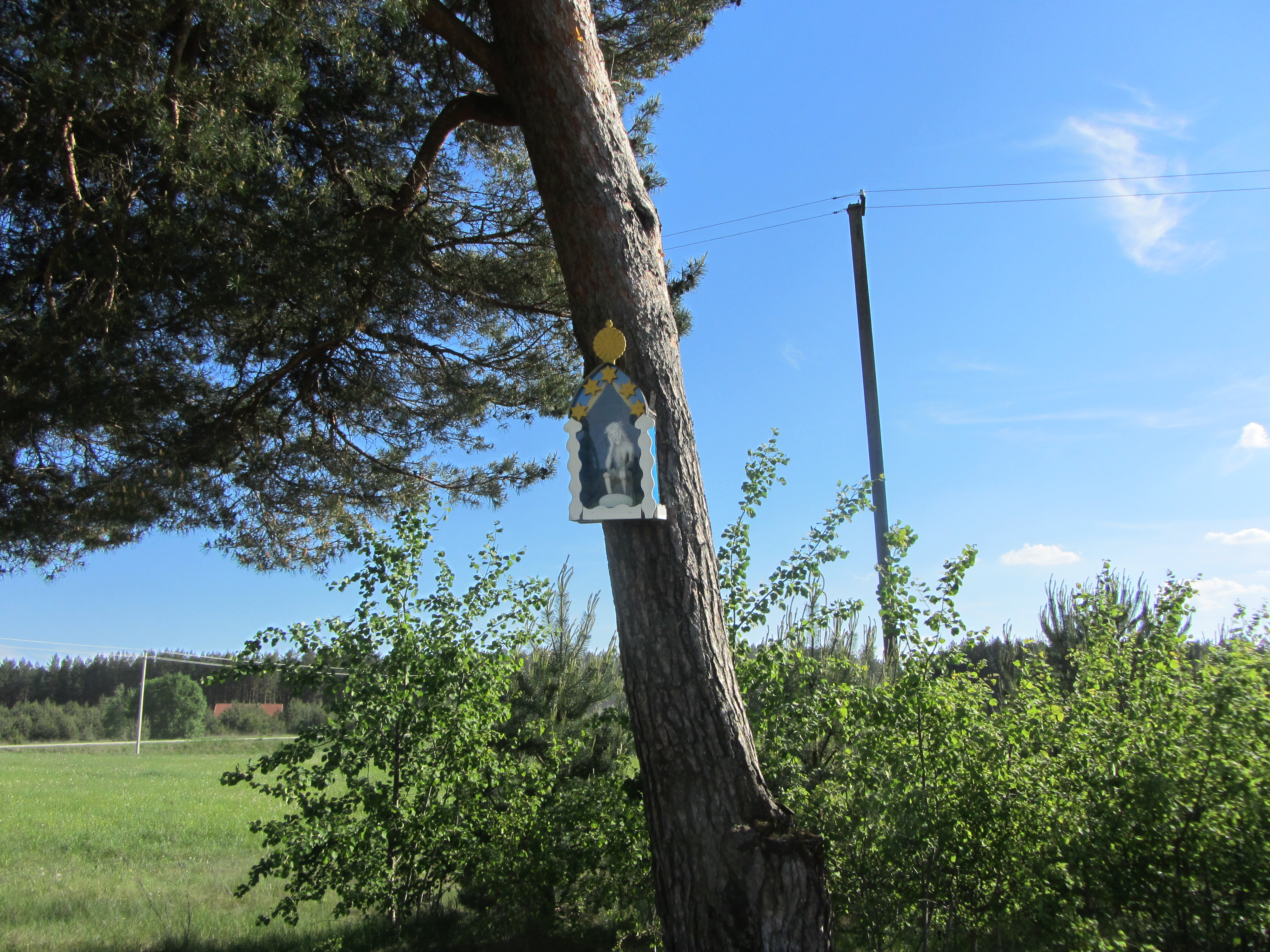 Suginčių sen., Lithuania